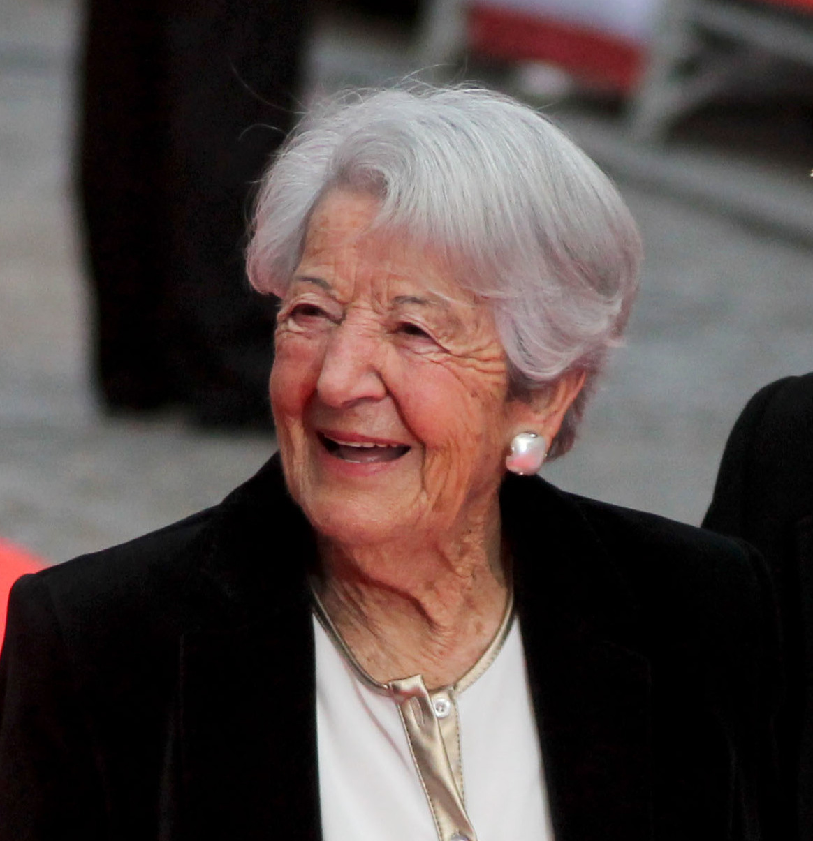 Seminci 2015